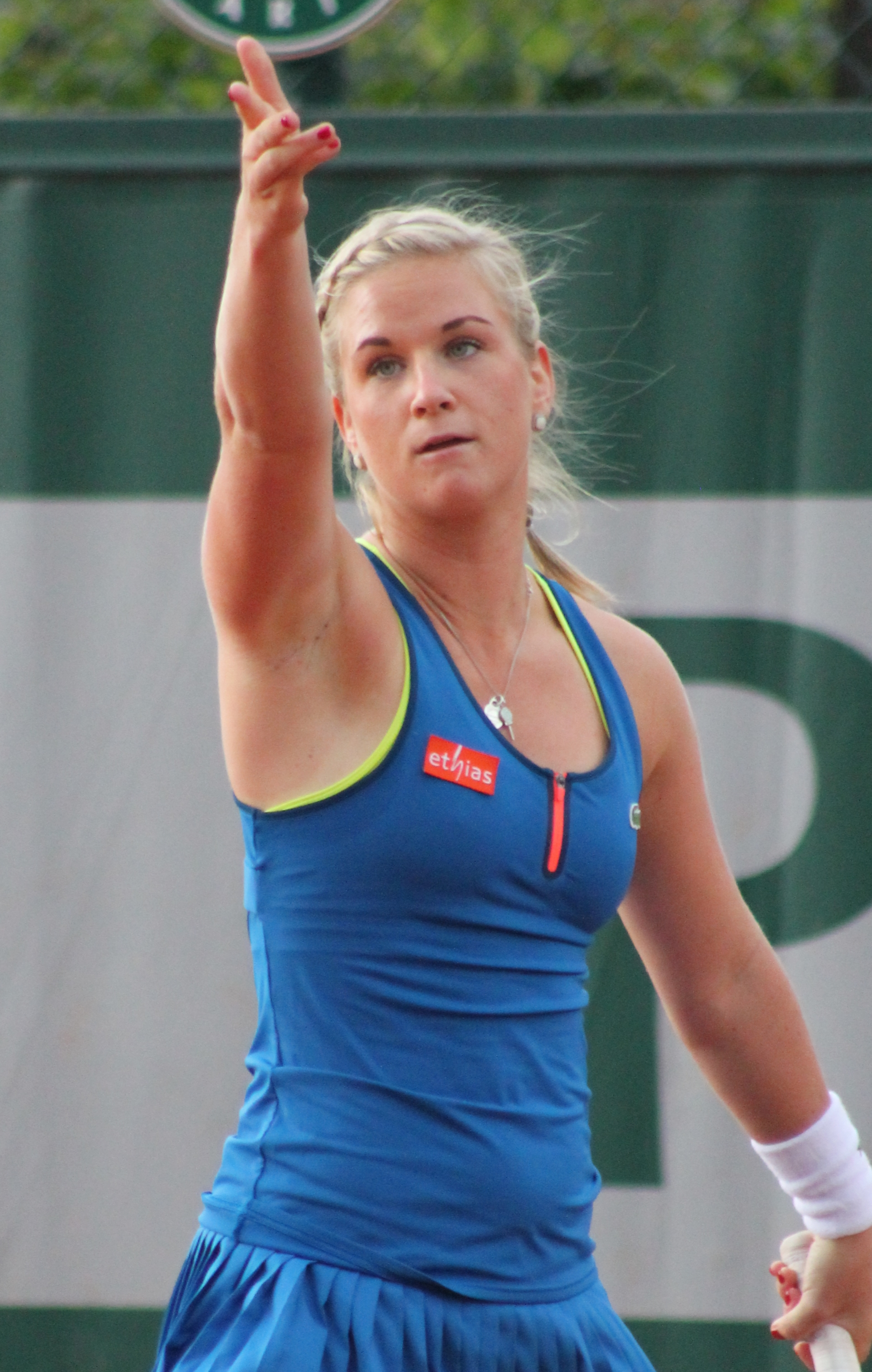 Bonaventure RG15 (8)